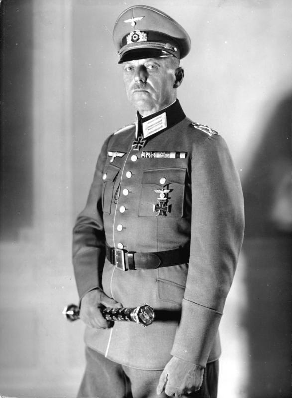 Gerd v. Rundstedt Generalfeldmarschall Gerd von Rundstedt [Gerd von Rundstedt mit Marschallstab (Porträt)] Abgebildete Personen: Rundstedt, Gerd von: Generalfeldmarschall, Ritterkreuz (RK), Heer, Deutschland (GND 118939327)